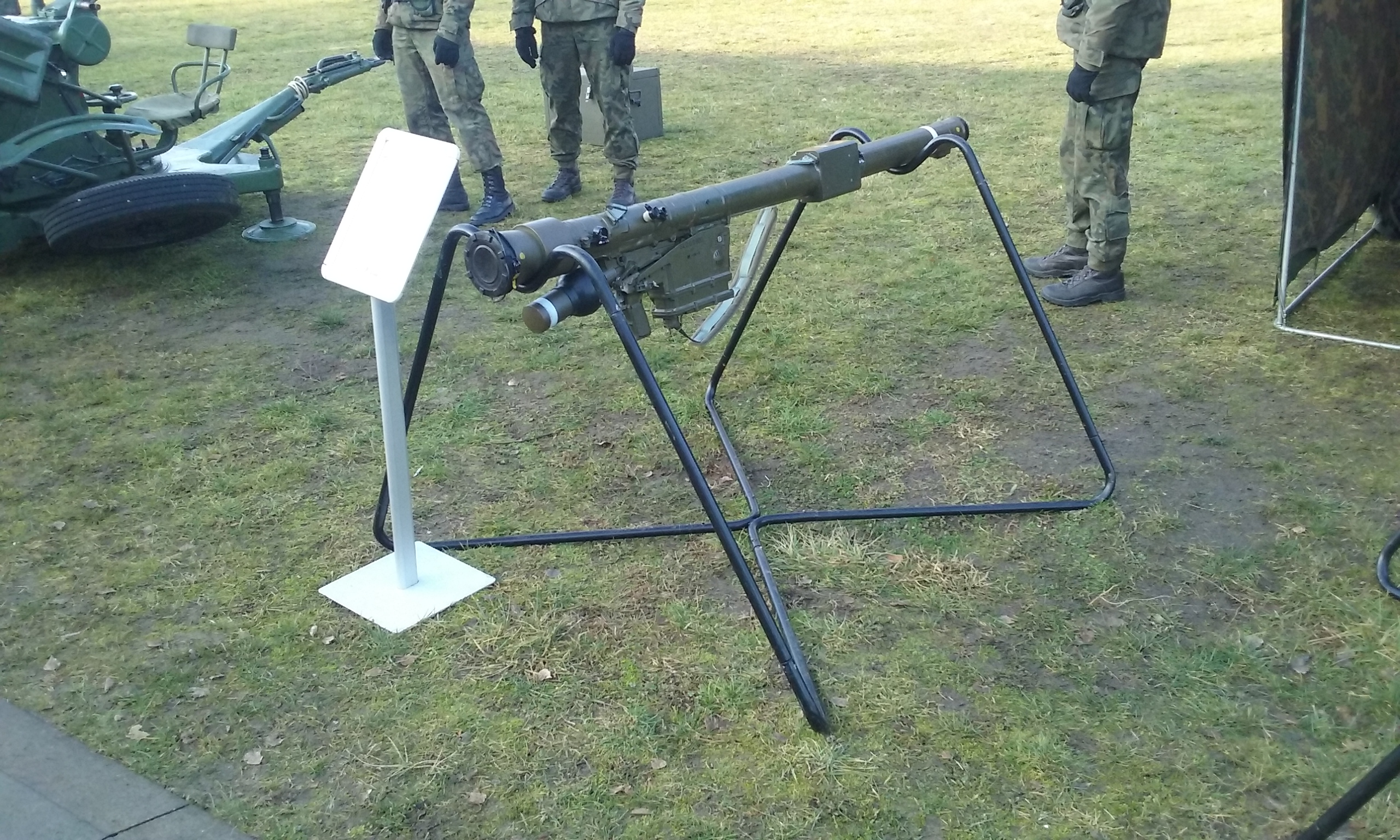 Przenośny Przeciwlotniczy Zestaw Rakietowy „Grom” z wyposażenia jednostki w Tomaszowie Mazowieckim